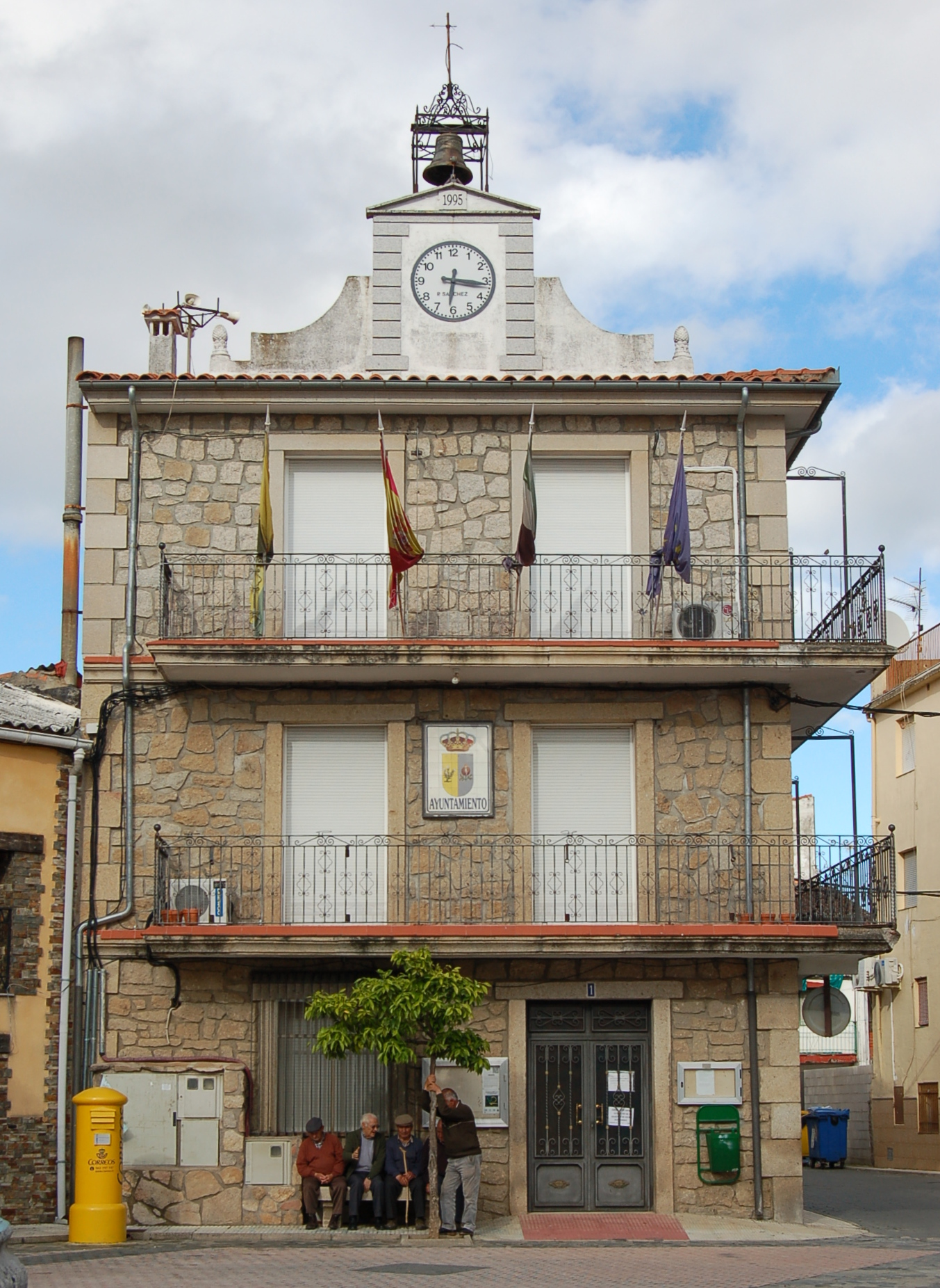 Casa consistorial de Mohedas de Granadilla